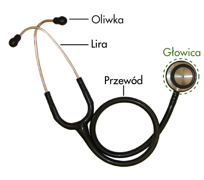 stetoskop